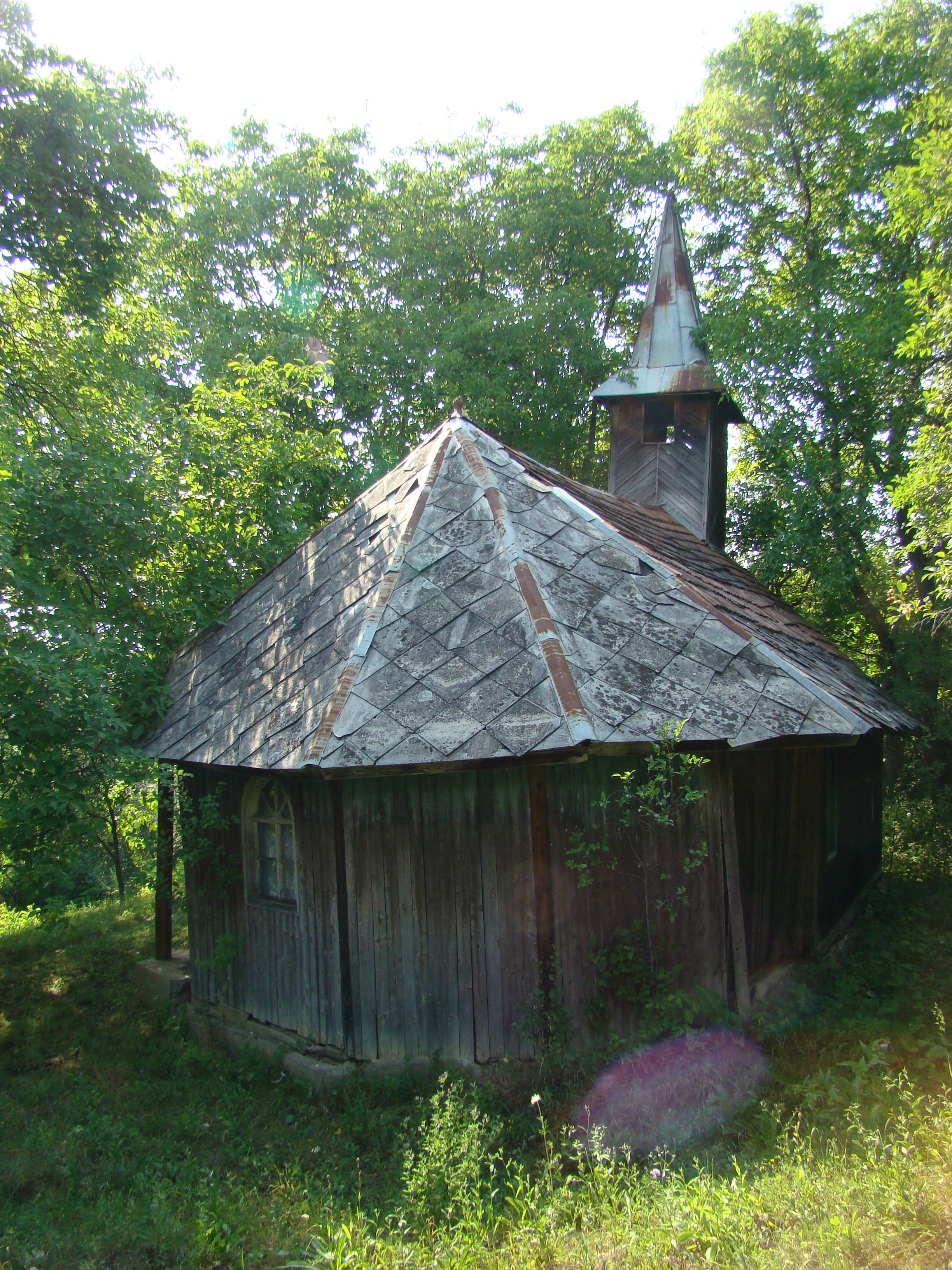 Biserica de lemn "Sf. Ioan Botezătorul" , sat COMLOD; comuna MILAŞ